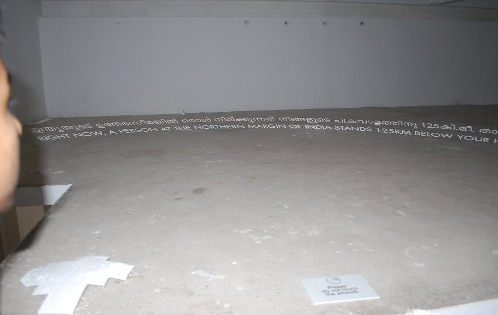 റീസന്റ്‌ലി, ദി നോൺ ഫ്ളാറ്റ് എർത്ത് പാരാഡിം പ്രതിഷ്ഠാപനം കാണുന്നയാൾ